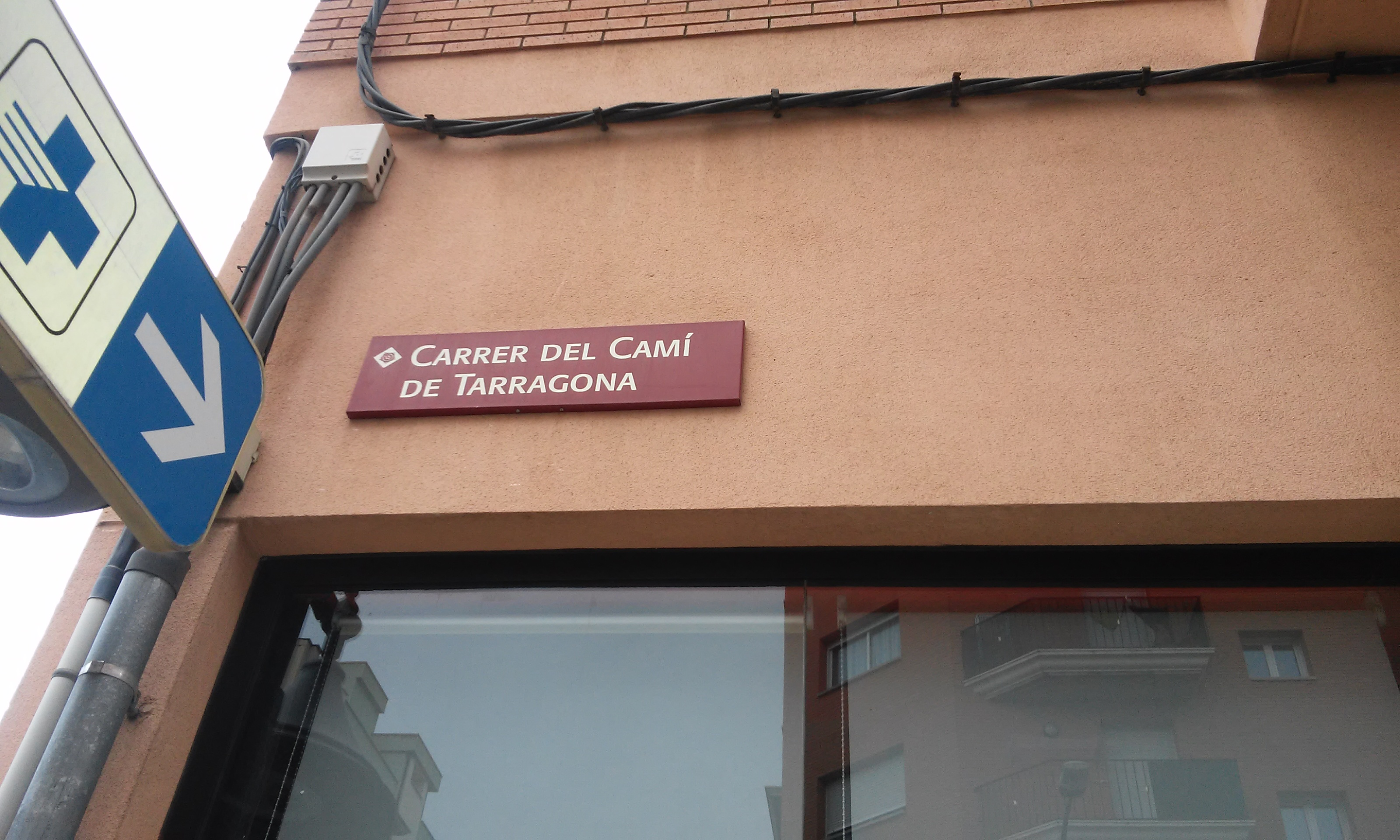 El carrer del camí de Tarragona, per on passava l'antic camí que va de Reus a Tarragona